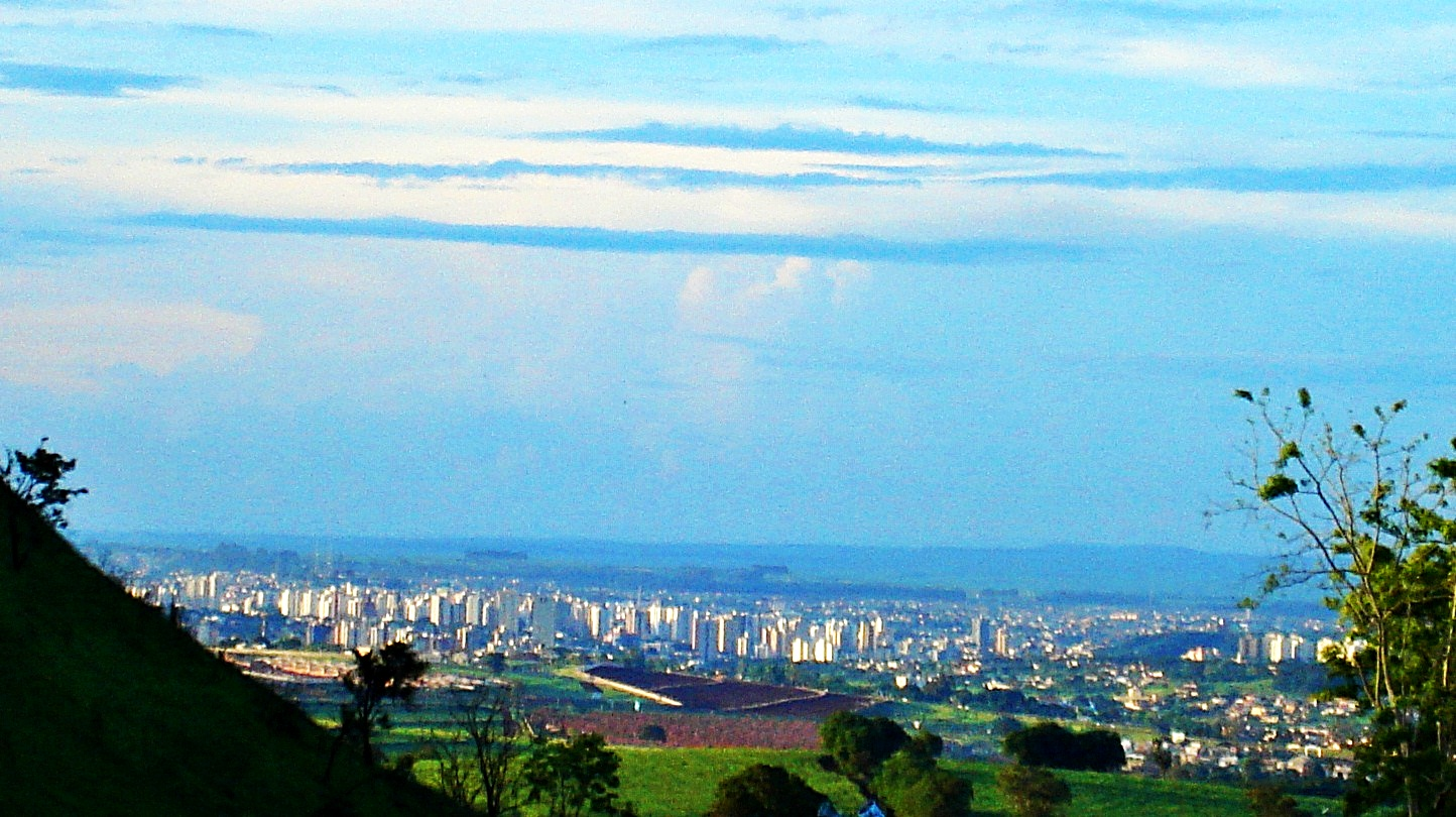 A cidade de Ribeirão Preto, São Paulo.